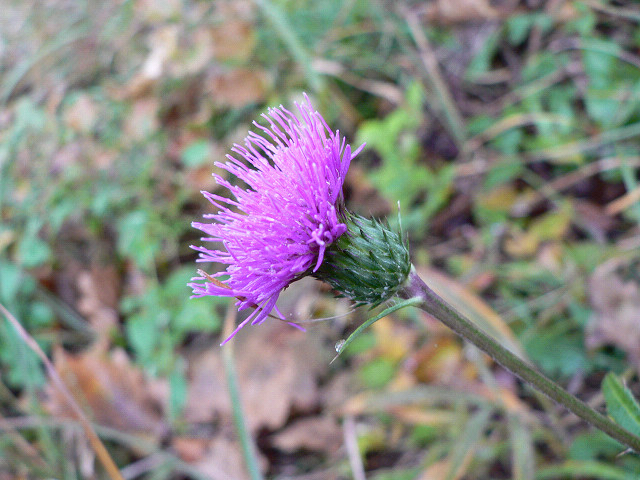 ノハラアザミ (神奈川県藤野町で撮影) Cirsium oligophyllum (syn. C. tanakae) (Fujino-town, Kanagawa, JAPAN)